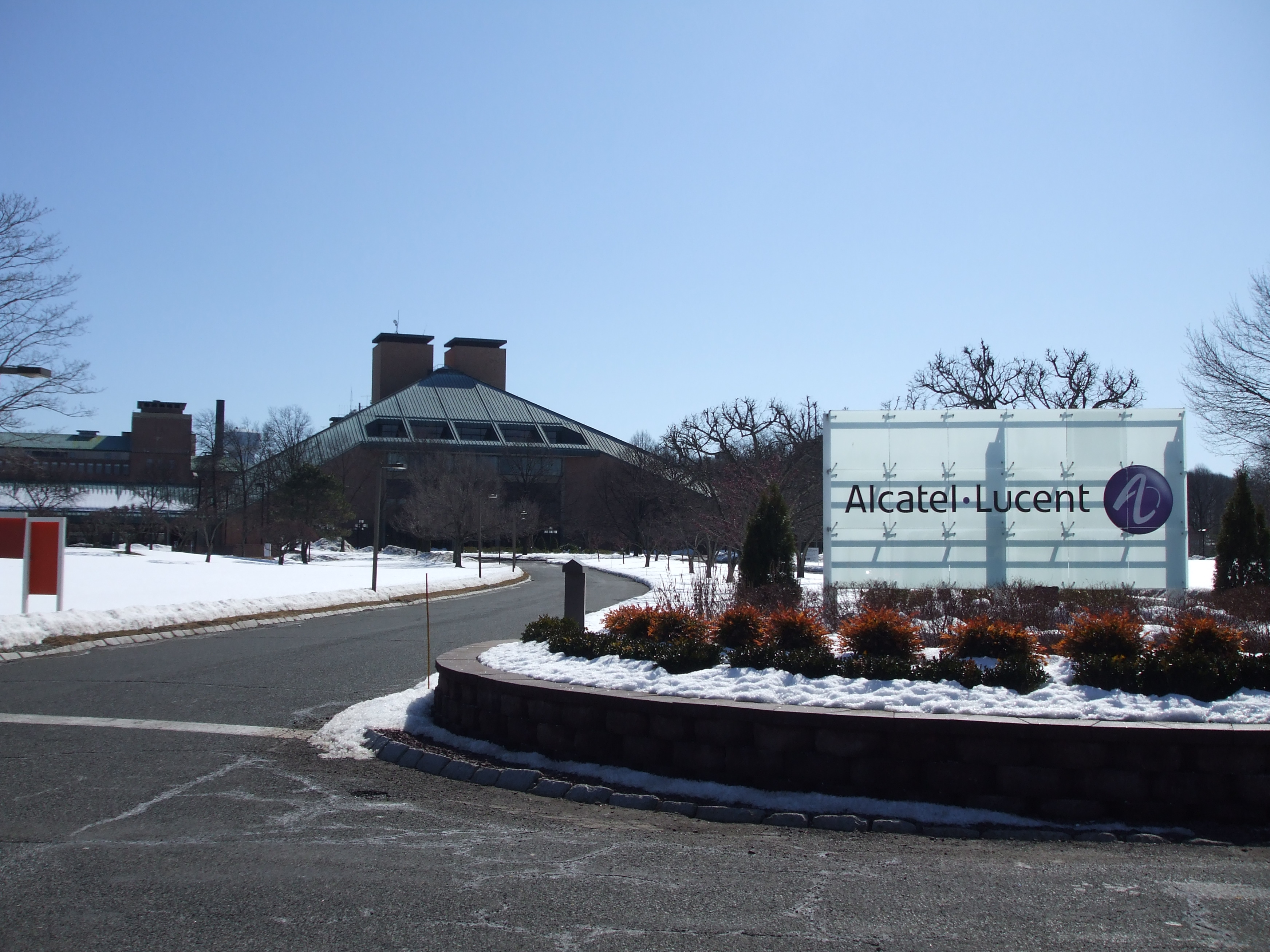 Alcatel-Lucent Standort in Murray Hill, New Jersey, USA. keine